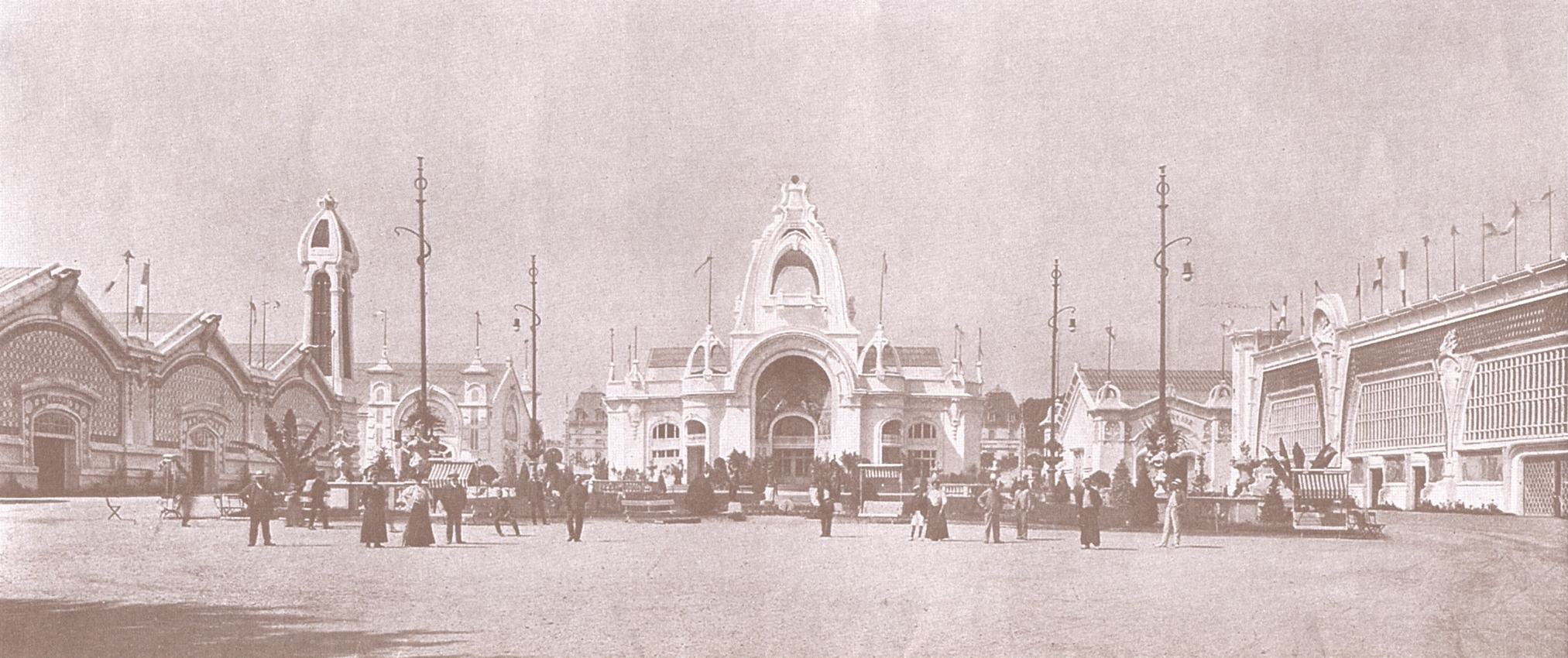 Exposition Internationale de l'Est de la France - vue générale sur les palais, Nancy, Lorraine, France